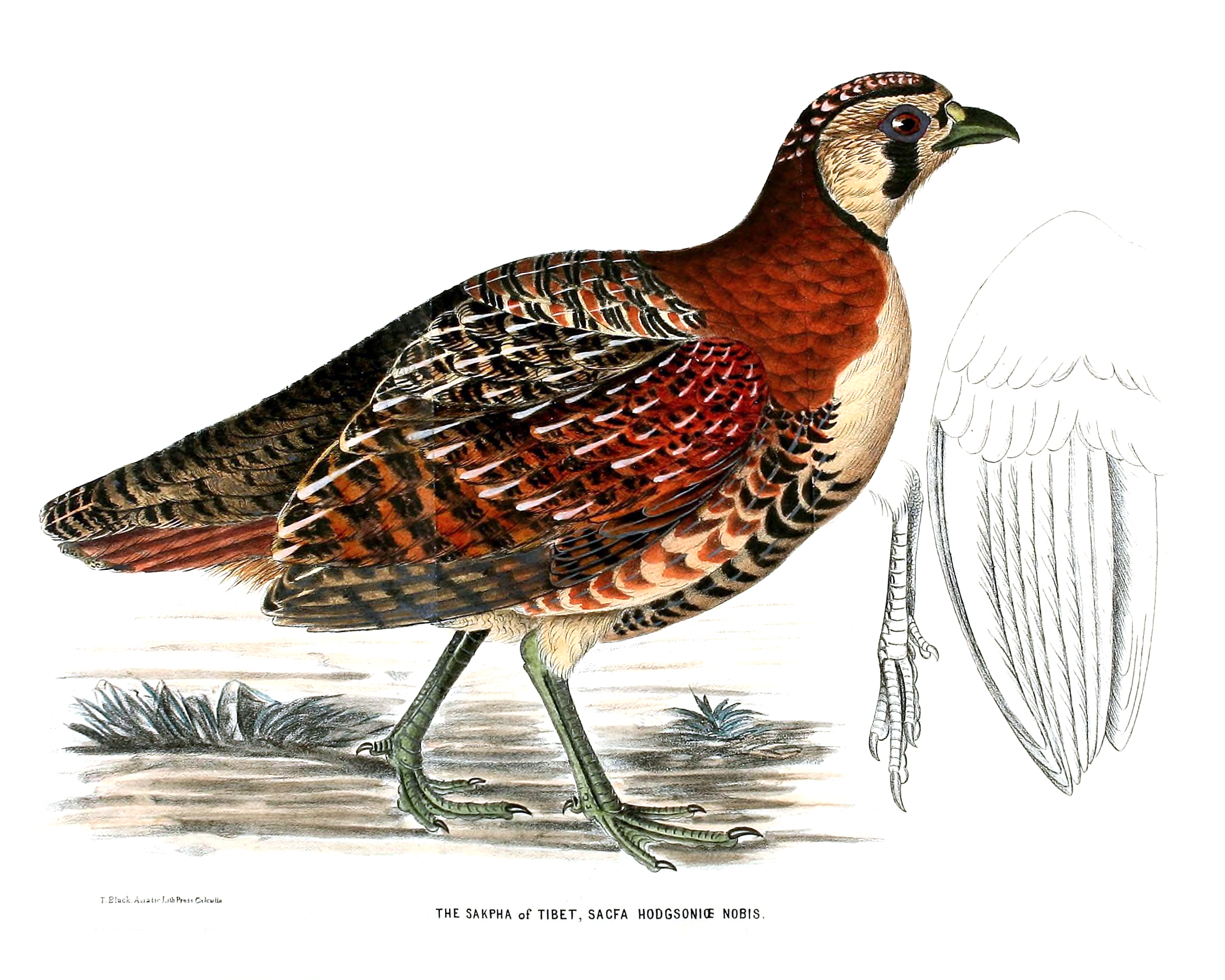 Perdix hodgsoniae